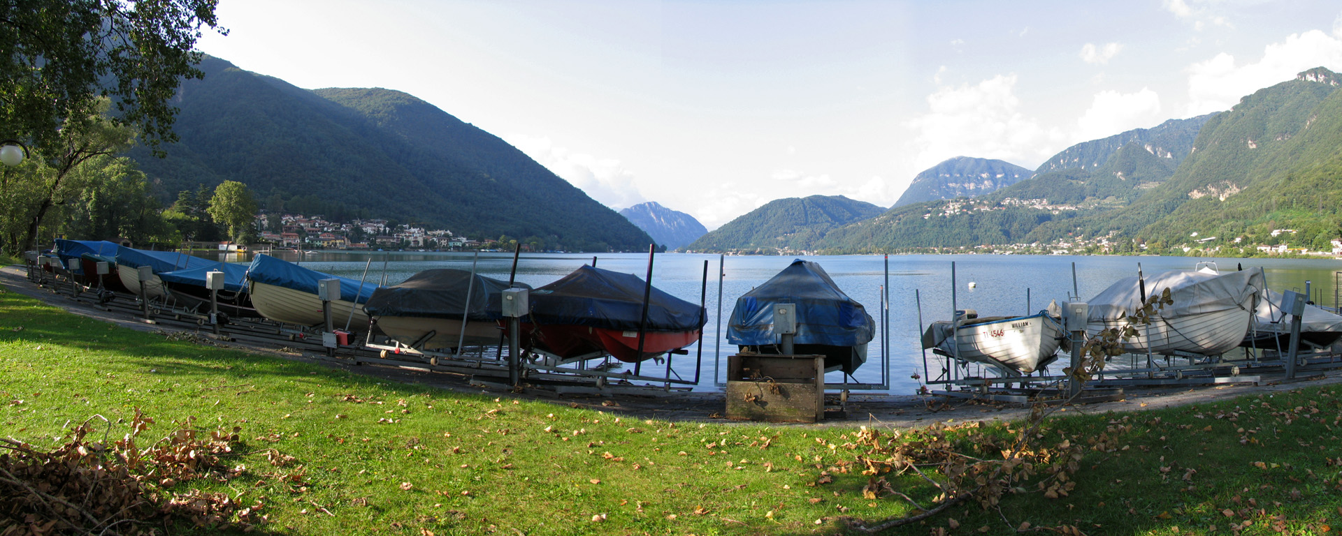 Capolago 09/2008